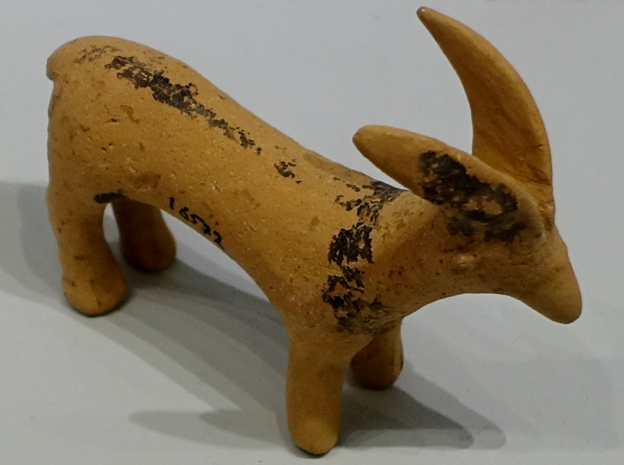 Kleine Figur eines Steinbocks aus Ton vom Gipfelheiligtum Traostalos (1700–1500 v. Chr.), ausgestellt im Archäologischen Museum Iraklio, Kreta, Griechenland